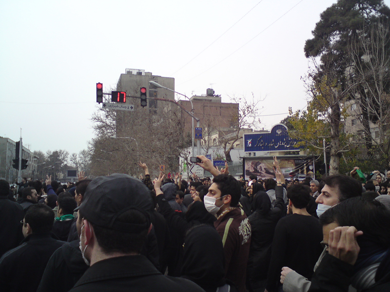 راهپیمایی جنبش سبز در روزعاشورا در خیابان طالقانی